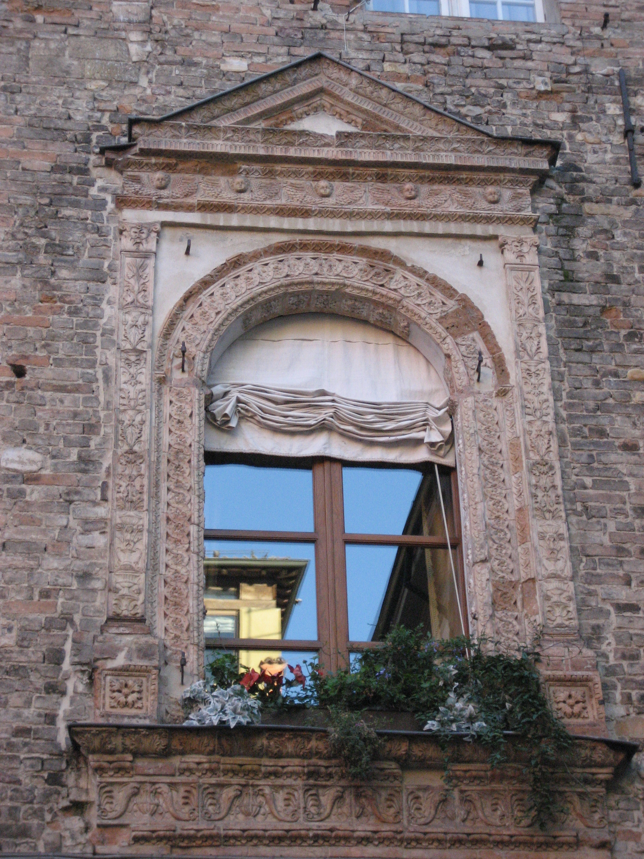 Finestra rinascimentale di Palazzo Tirelli in Parma